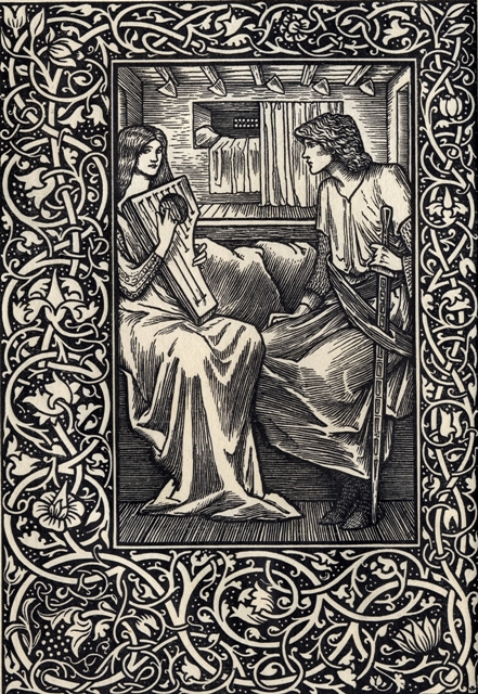 Gottfried von Straßburg: The Story of Tristan and Iseult. Übersetzung aus dem Deutschen Jessie L. Weston. Illustrationen Caroline Watts. 1899 (1902)